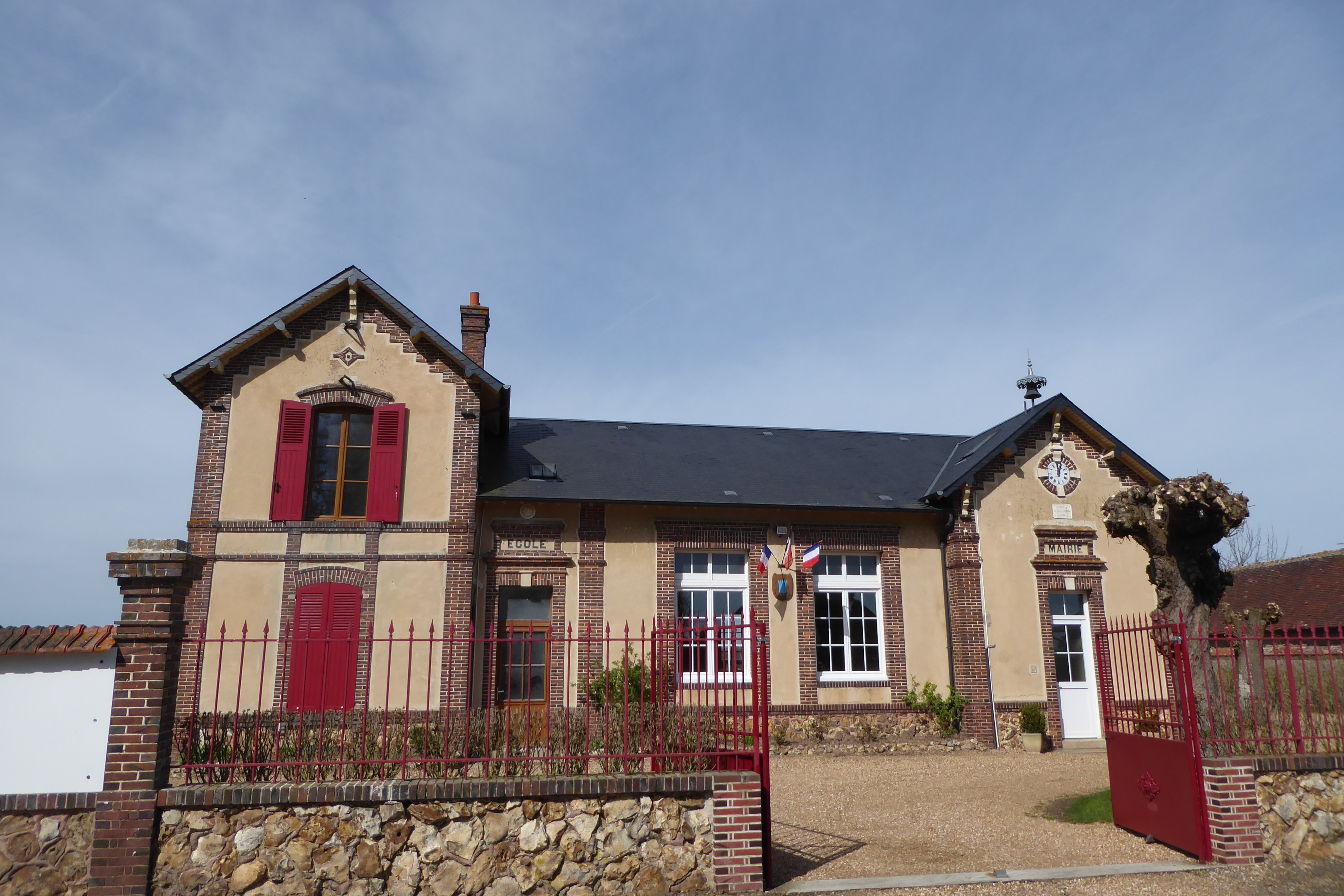 mairie-école de Torçay, Eure-et-Loir, France.